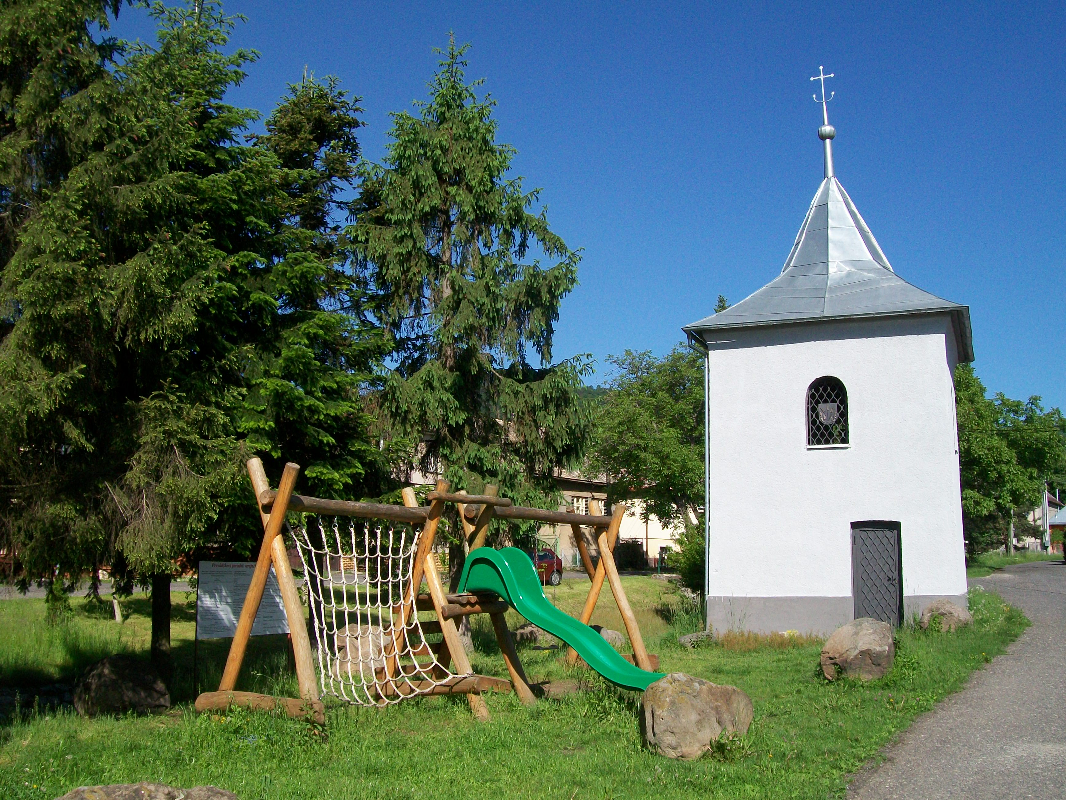 Preliezačka so šmýkačkou pre deti pri zvonici v obci Lupoč